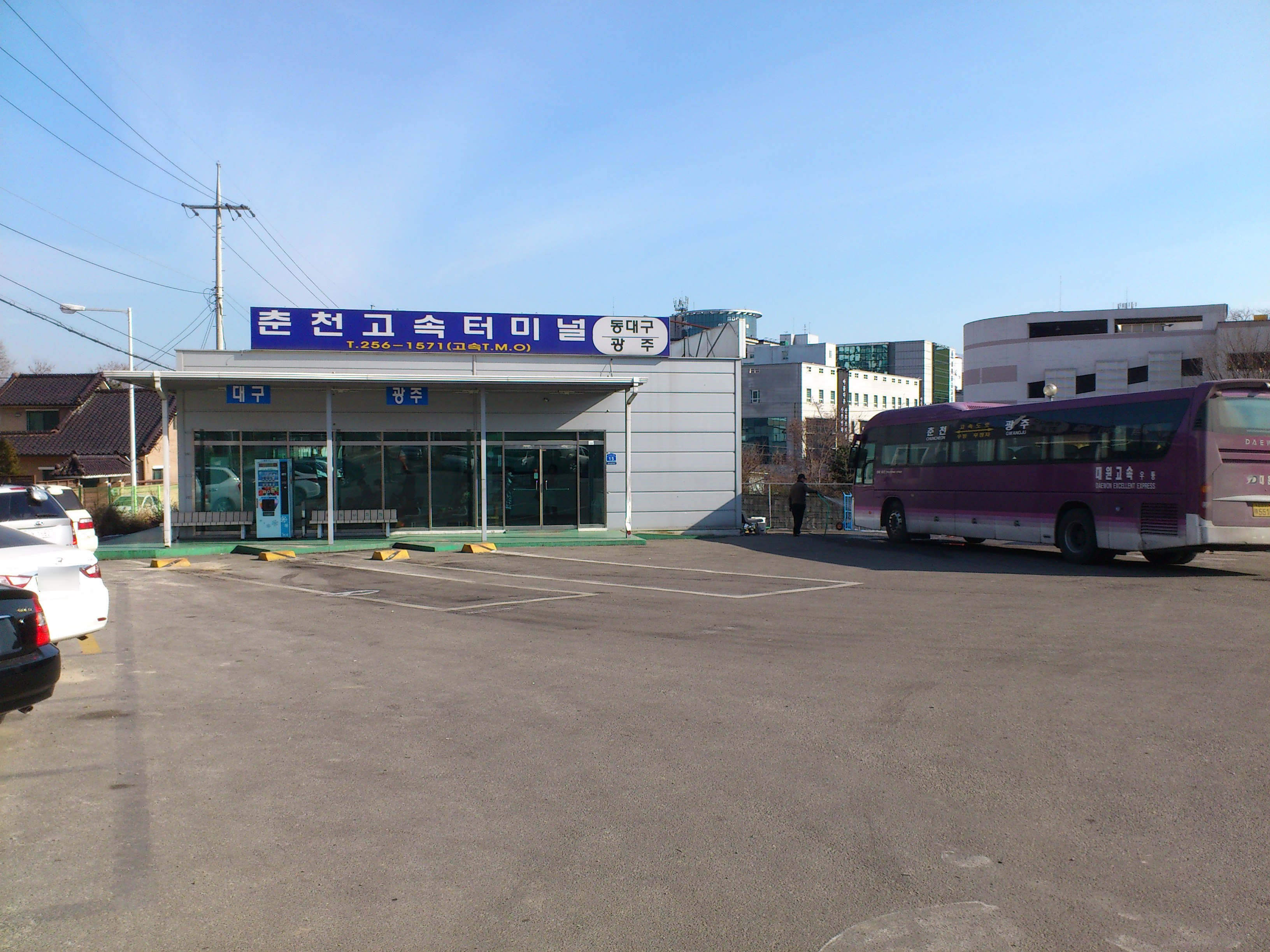 춘천고속버스터미널